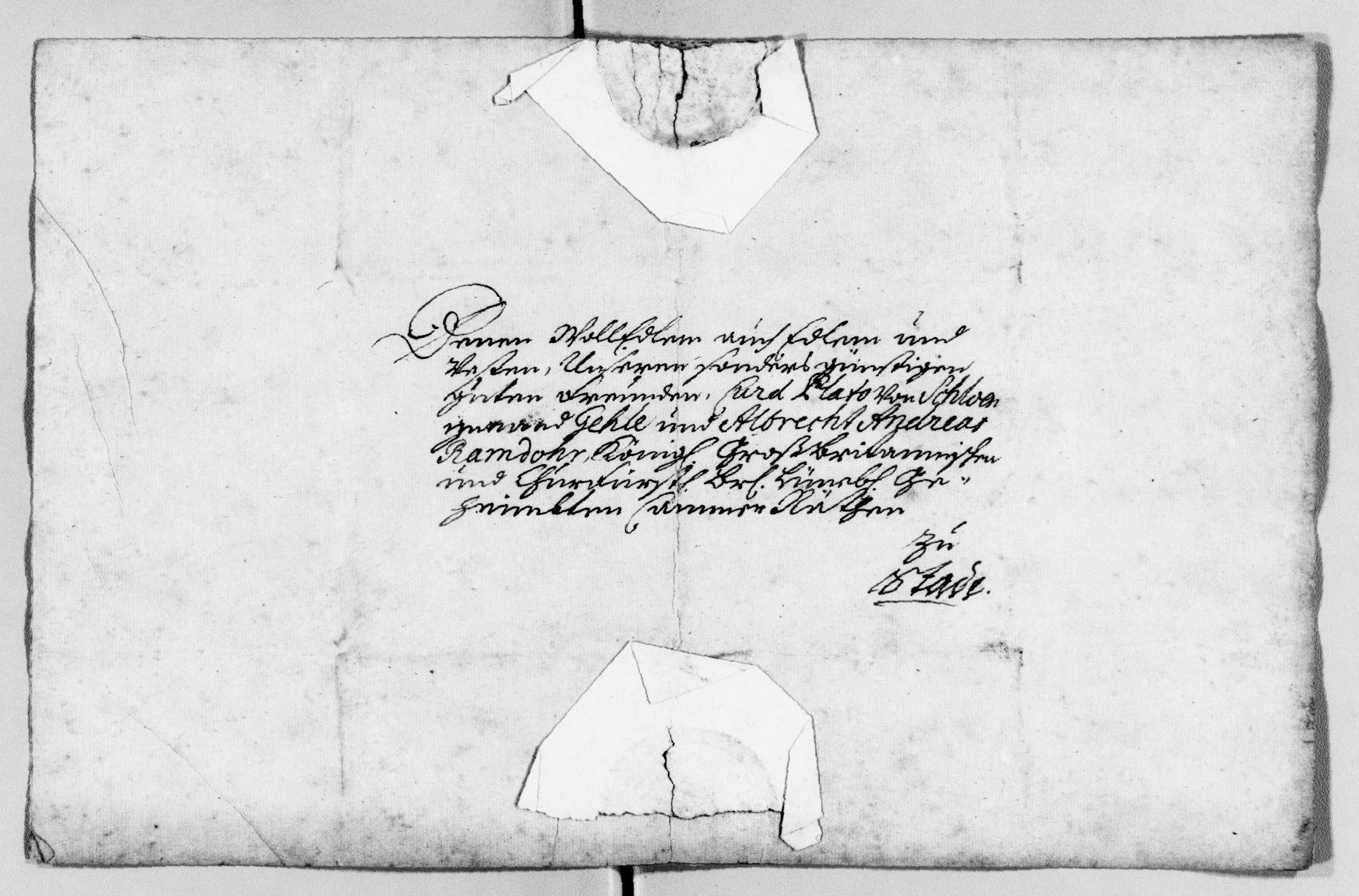 Umschlag eines Briefs von Minister Joachim Heinrich von Bülow (1650-1724) vom 10. Jan 1716 an Crod Plato von Schloen, gen. Gehle, und Albrecht Andreas von Ramdohr zu Stade